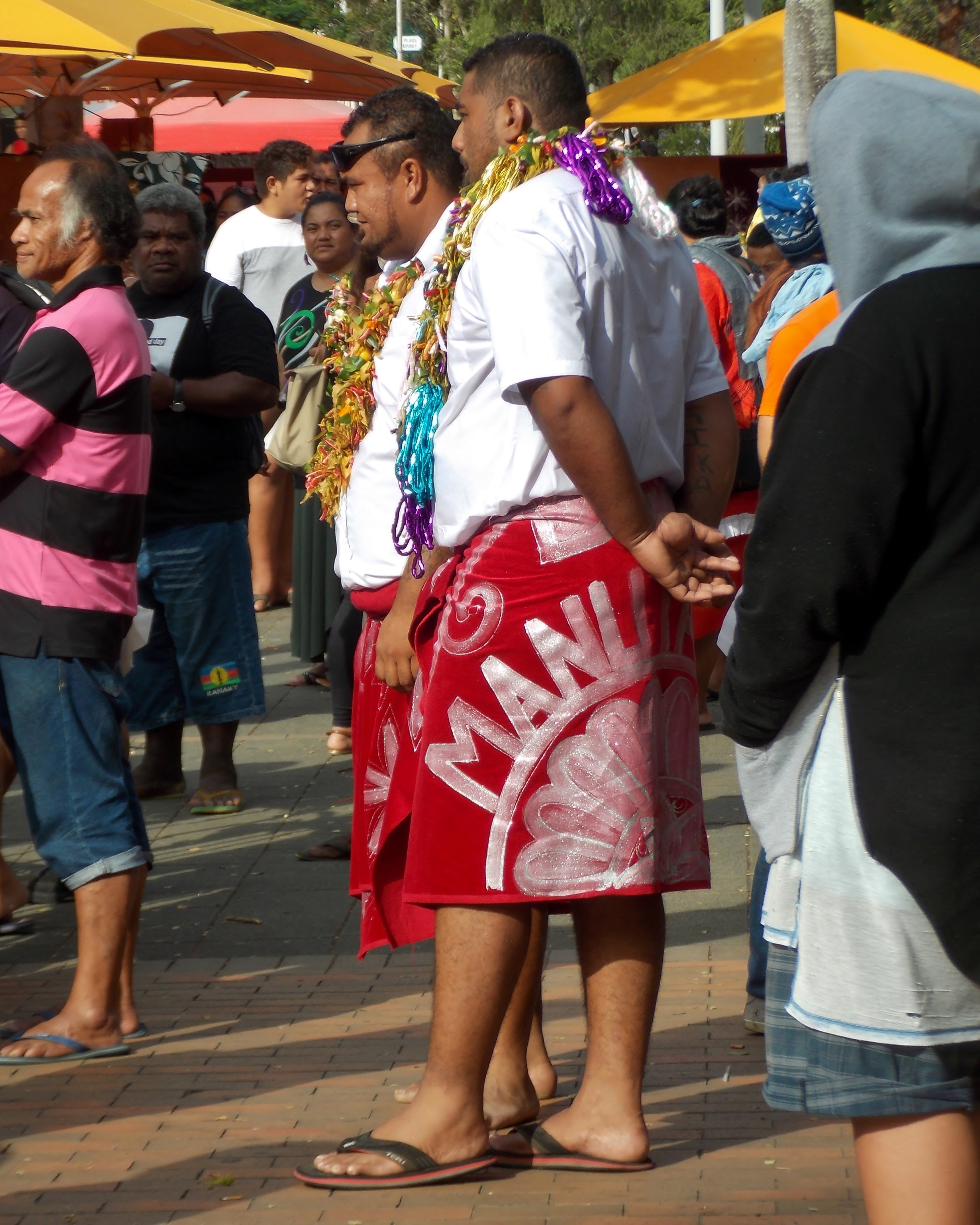 Deux Wallisiens et Futuniens de Nouvelle-Calédonie, portant un manou (paréo) rouge et blanc (le mot écrit est "manu'ia" : force, courage) et un collier de fleurs (en plastique) sur une chemise blanche, dans le cadre d'un "jeudi de Wallis et Futuna" : un groupe présente les produits et les danses de Wallis et Futuna dans le centre-ville de Nouméa.